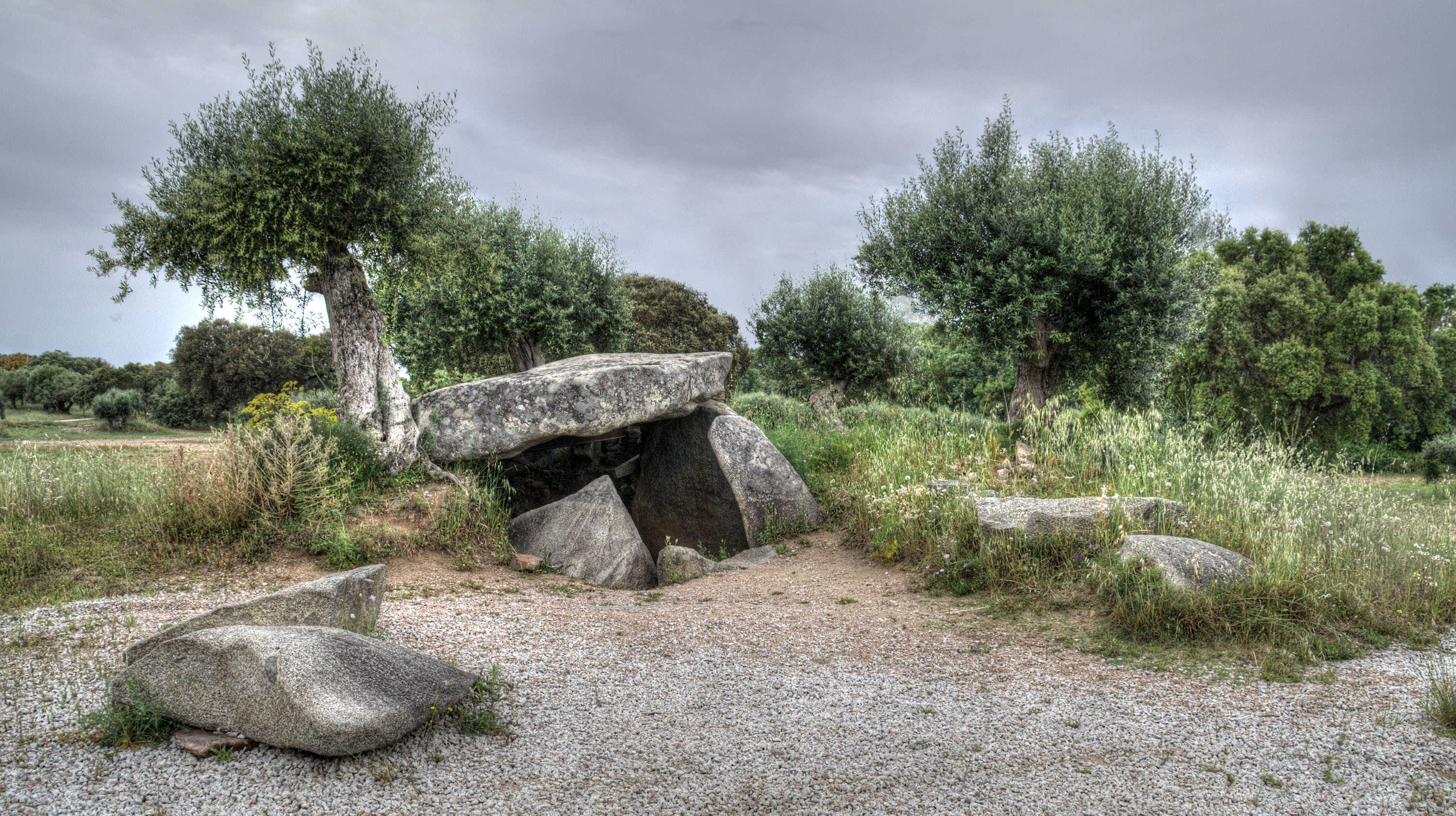 Del IV milenio a.C. está en Reguengos de Monsaraz (Portugal). Dicen que hay más estructuras en la zona hasta conformar un conjunto de dos dólmenes y un tholos pero actualmente no son visibles. En este lugar se encontraron unos 140 enterramientos [dolmen = anta, en portugués]